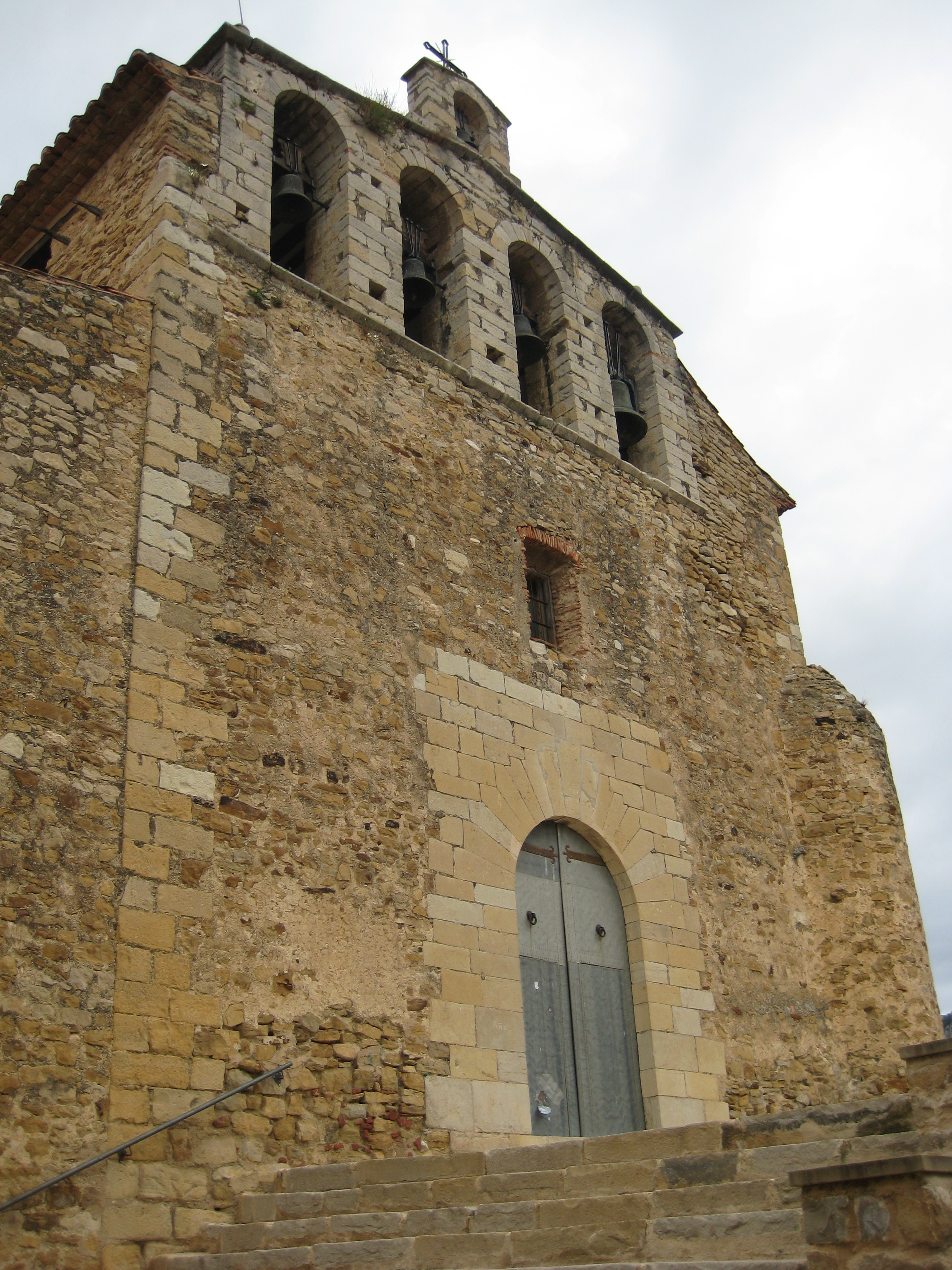 Façana principal de l'església vella de Xert (Baix Maestrat)